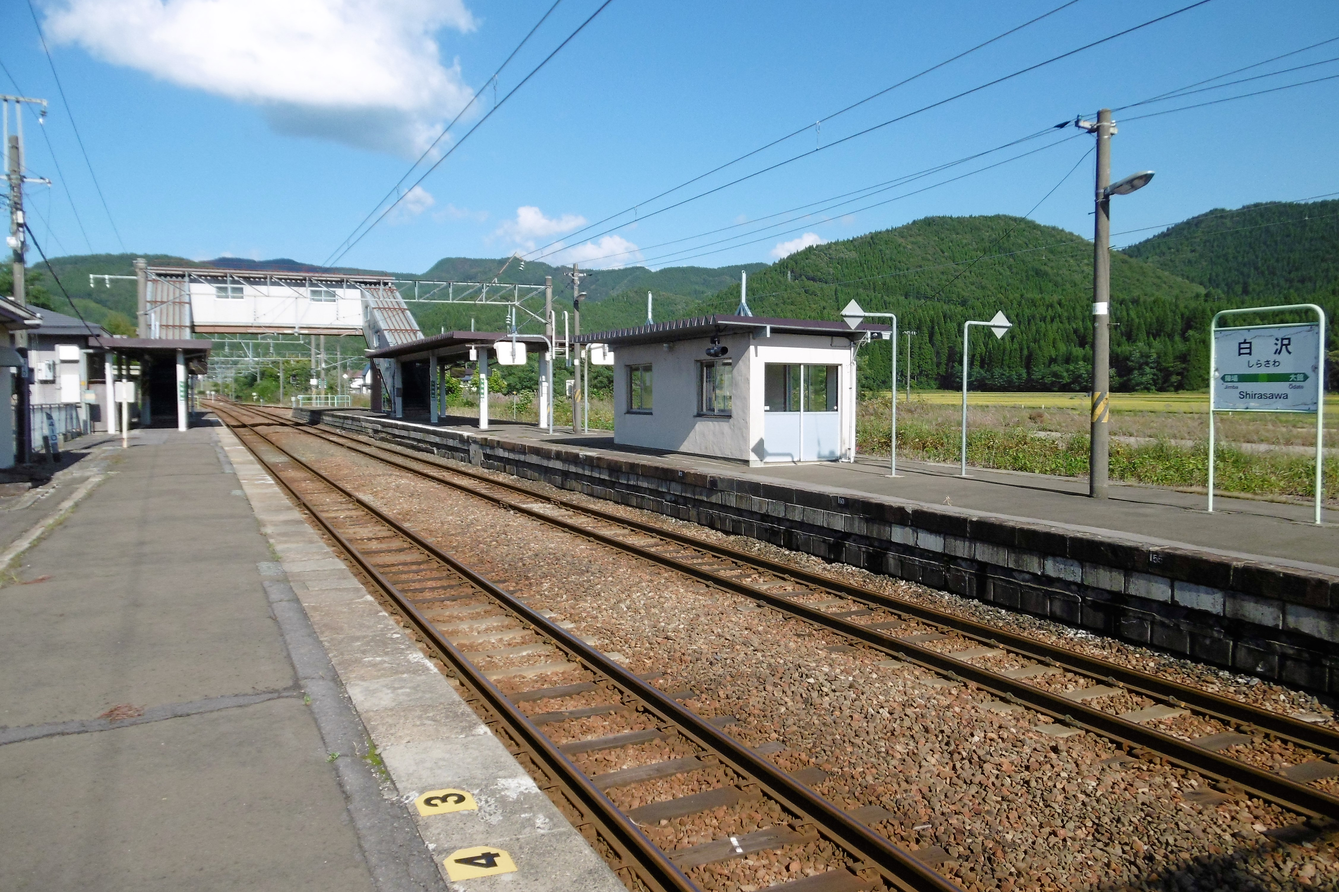 JR白沢駅 :秋田県大館市白沢